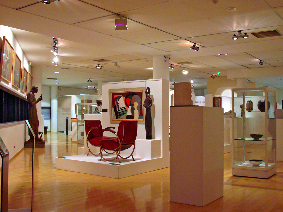 La salle du 3ème étage du musée des années 30 à Boulogne-Billancourt